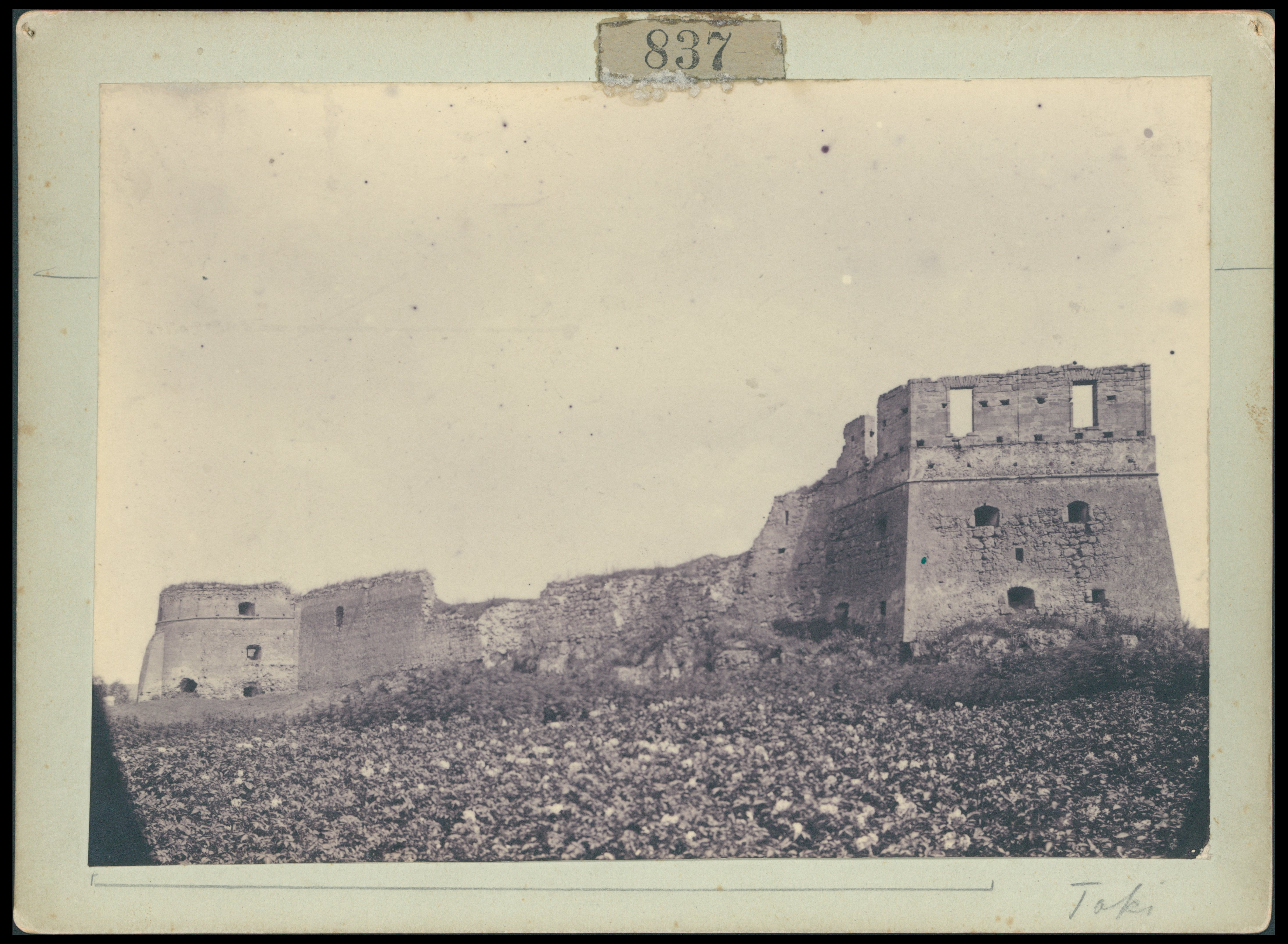 Zamek w Tokach ca 1815